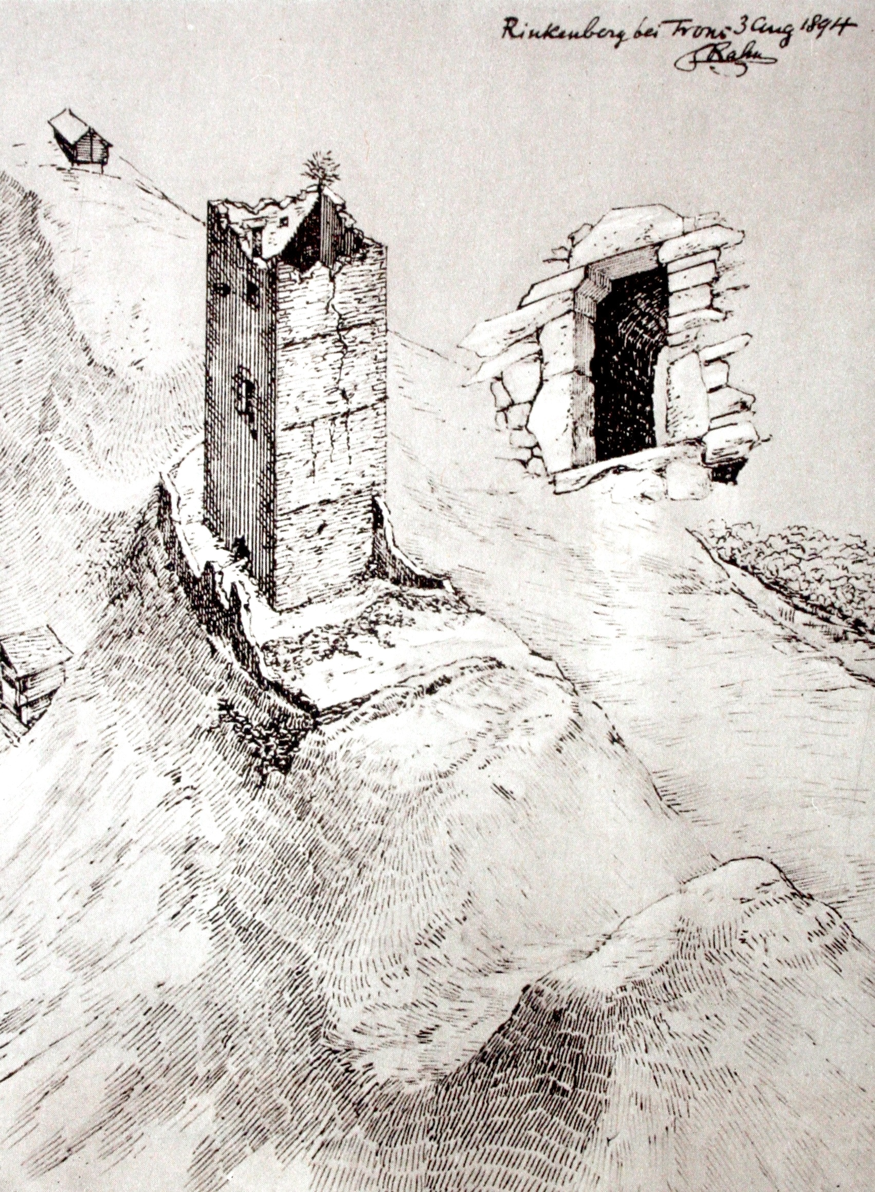 Ruine Ringgenberg GR am 3. August 1894, Zeichnung von J. Rahn